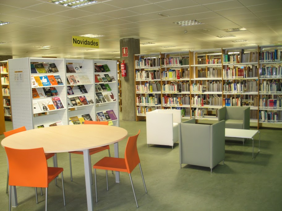 Sala de préstamo de la Biblioteca Nodal de Lugo